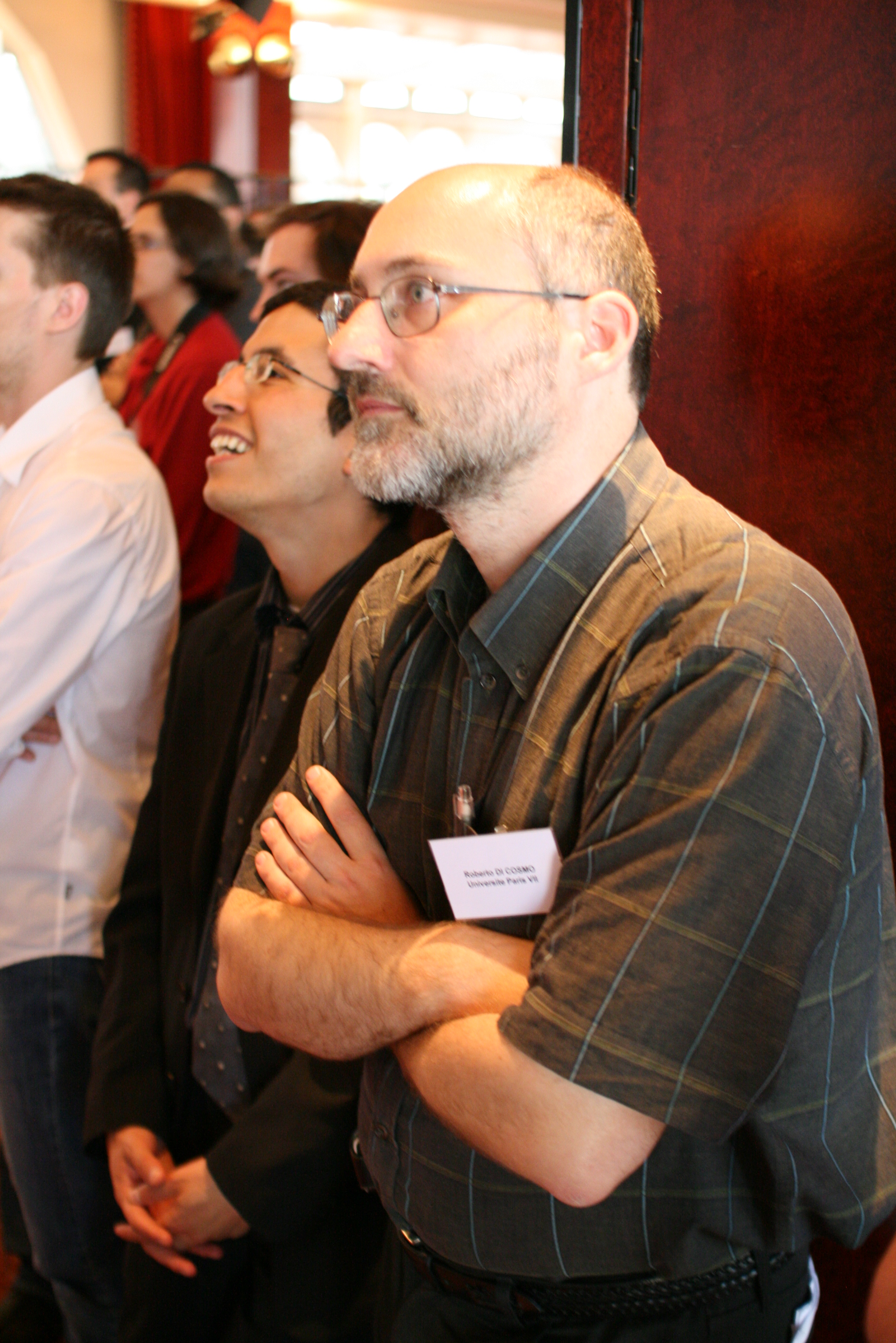 Roberto Di Cosmo